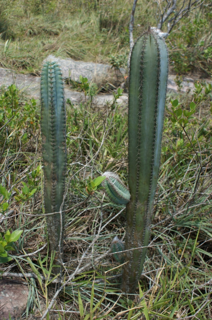 Pilosocereus pachycladus F.Ritter - CACTACEAE - Chapada Diamantina. Parque Natural Municipal Morro do Pai Inácio - Palmeiras - Bahia - Brasil.